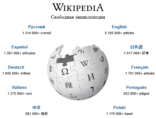 Русская Википедия вошла в десятку крупнейших. Скриншот сайта 5 июня 2016 года (двенадцатая версия)